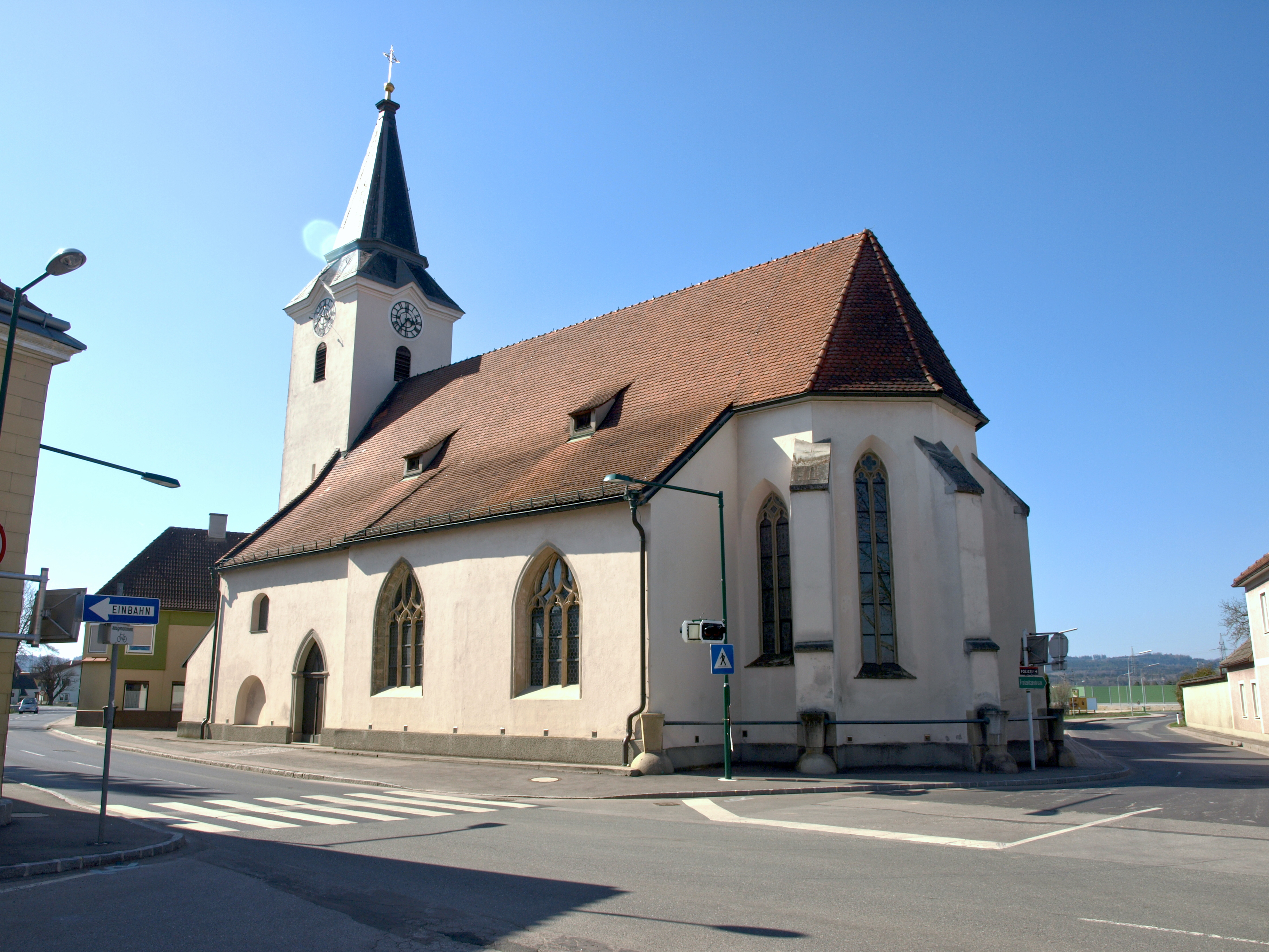 Kath. Pfarrkirche hl. Nikolaus